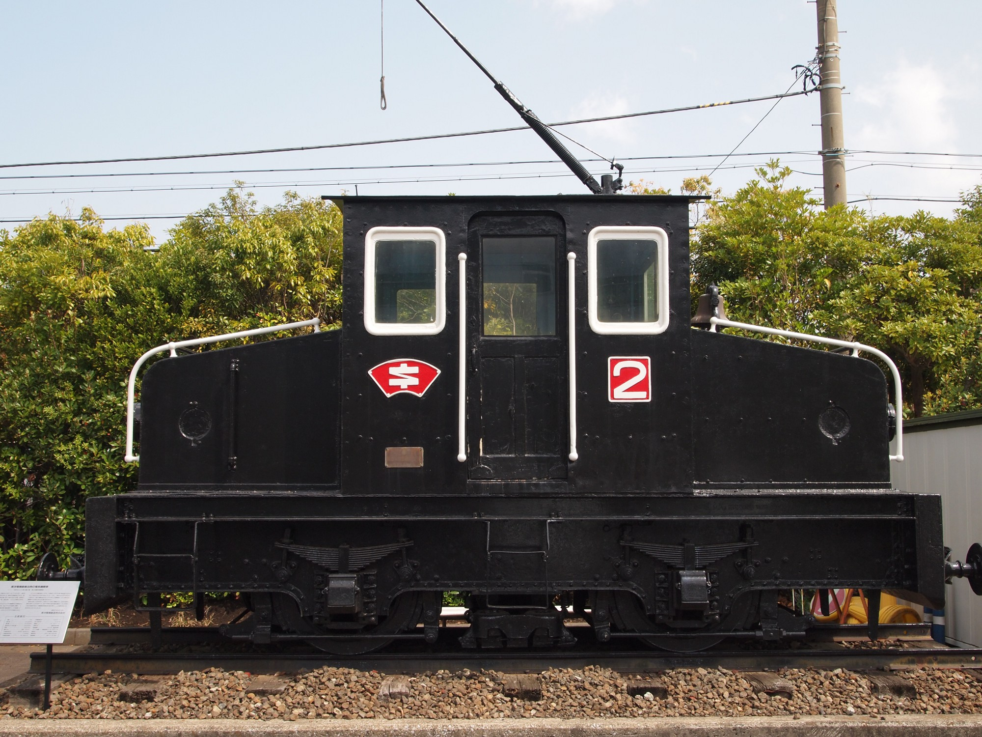 日本セメント上磯工場で大正11年から昭和50年代まで使用されていた2号電気機関車。 現在は東洋電機製造横浜工場（横浜市金沢区金沢工業団地内）の敷地内に展示されている。